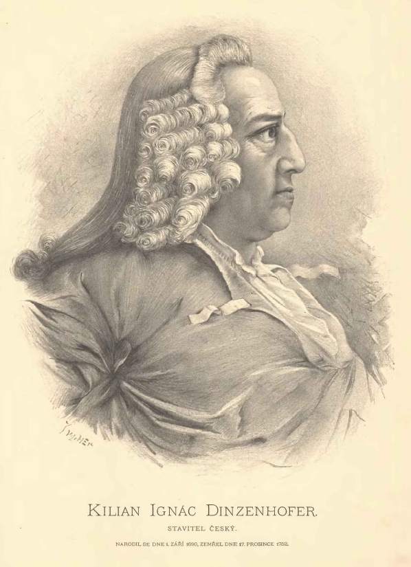 Portréty českých osobností od Jana Vilímka